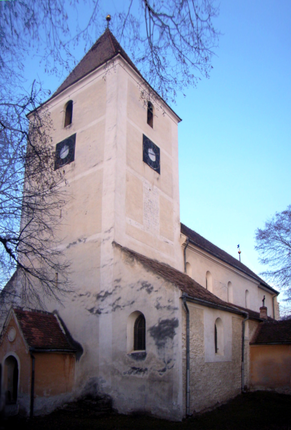 Evangelische Kirche von Hammersdorf (RO)